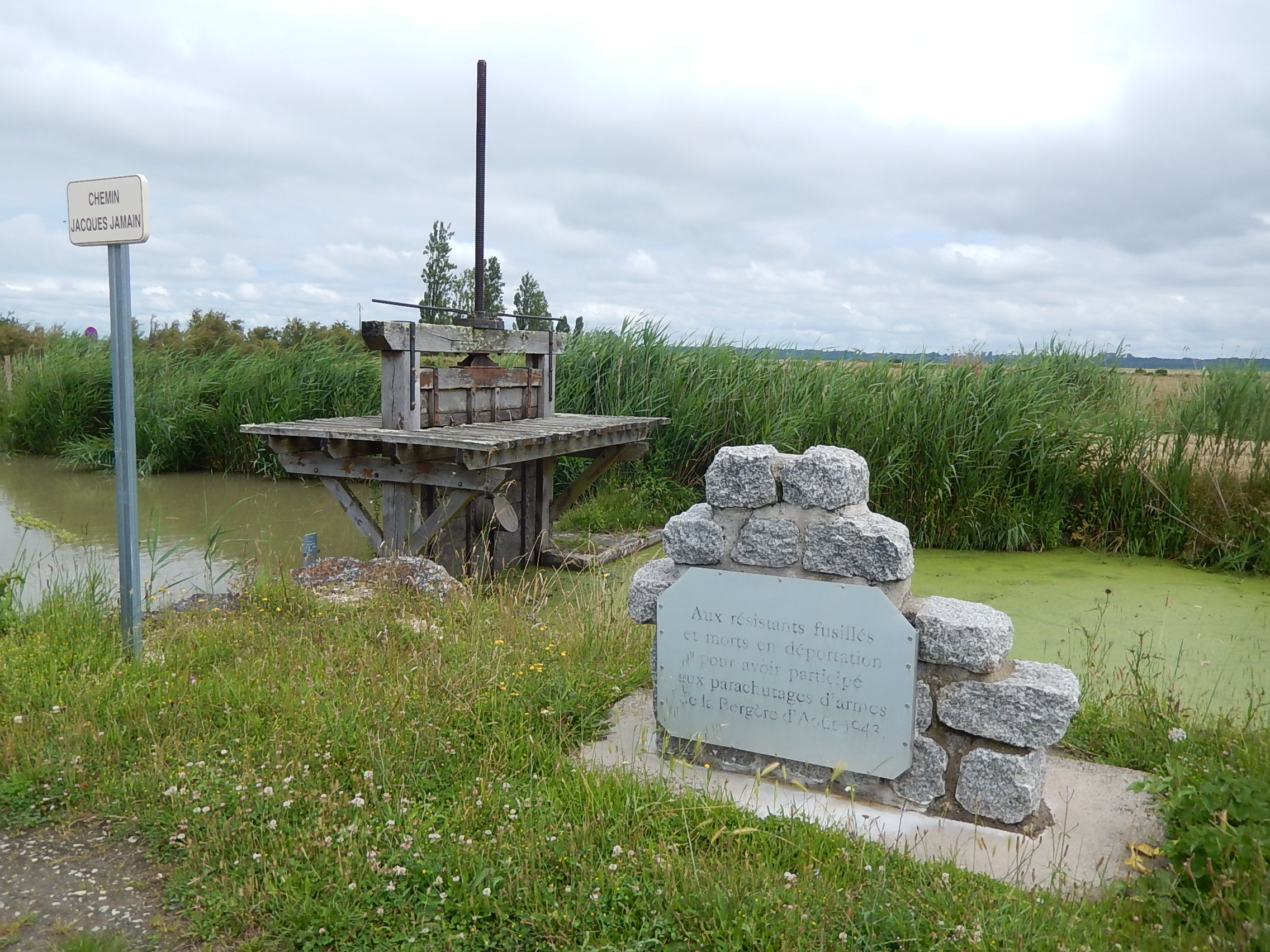 Une stèle située dans les marais, à l'est du bourg de Saint-Just, en mémoire des résistants fusillés et déportés suite à leur participation à des parachutages d'armes en 1943, pendant la Seconde Guerre Mondiale.